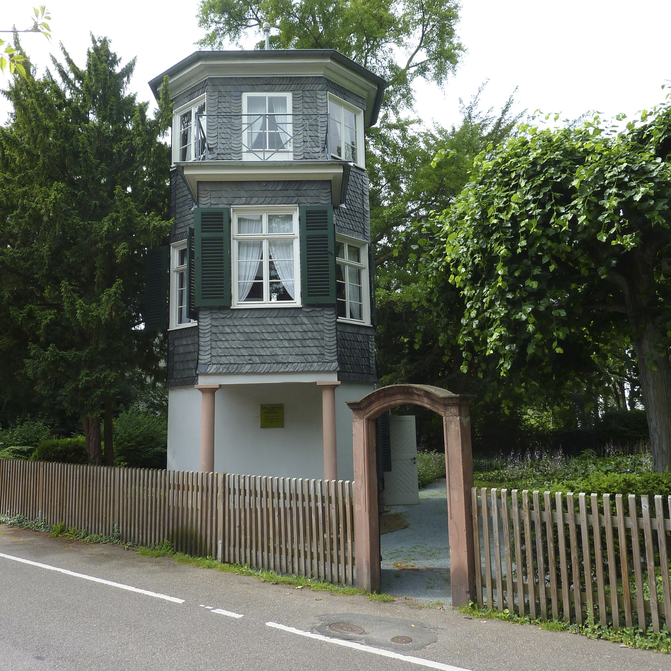 Frankfurt am Main, Stadtteil Sachsenhausen: Das Willemer-Häuschen oder Willemer-Gartenhaus ist ein klassizistisches Gartenhaus aus dem frühen 19. Jahrhundert. Bekannt wurde es durch die dortigen Begegnungen des Dichters Johann Wolgang von Goethe mit Marianne von Willemer im Jahr 1814. Im Zweiten Weltkrieg wurde das Originalgebäude zerstört und anschließend am selben Ort originalgetreu wieder aufgebaut. Heute befindet sich im Haus eine Goethe-Gedenkstätte. Das Foto zeigt eine Totale der Straßenfront des Gebäudes von Nordosten